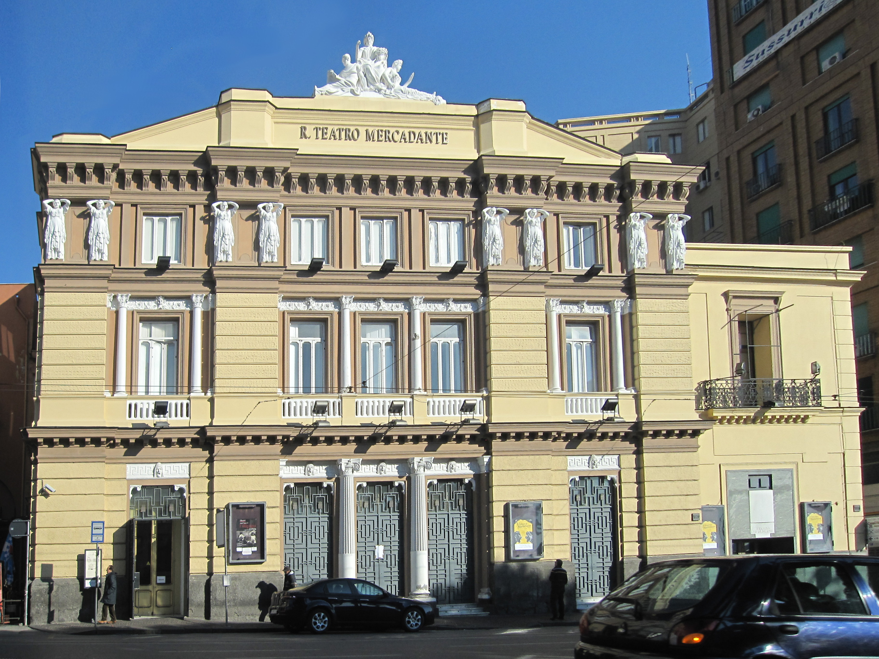 Facciata del teatro Mercadante (Napoli)